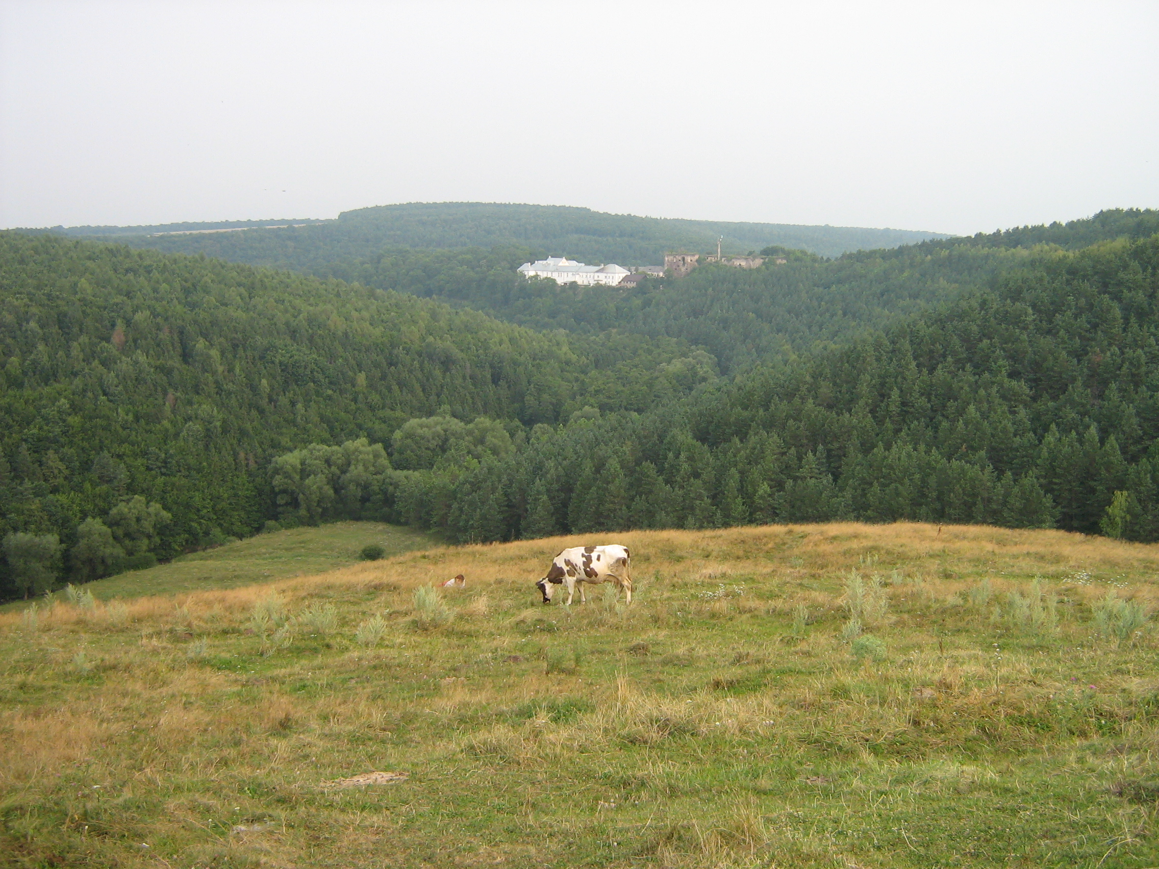 Вигляд на палац і замок у Язловці Бучацького району Тернопільської області з пагорба від с. Новосілка.